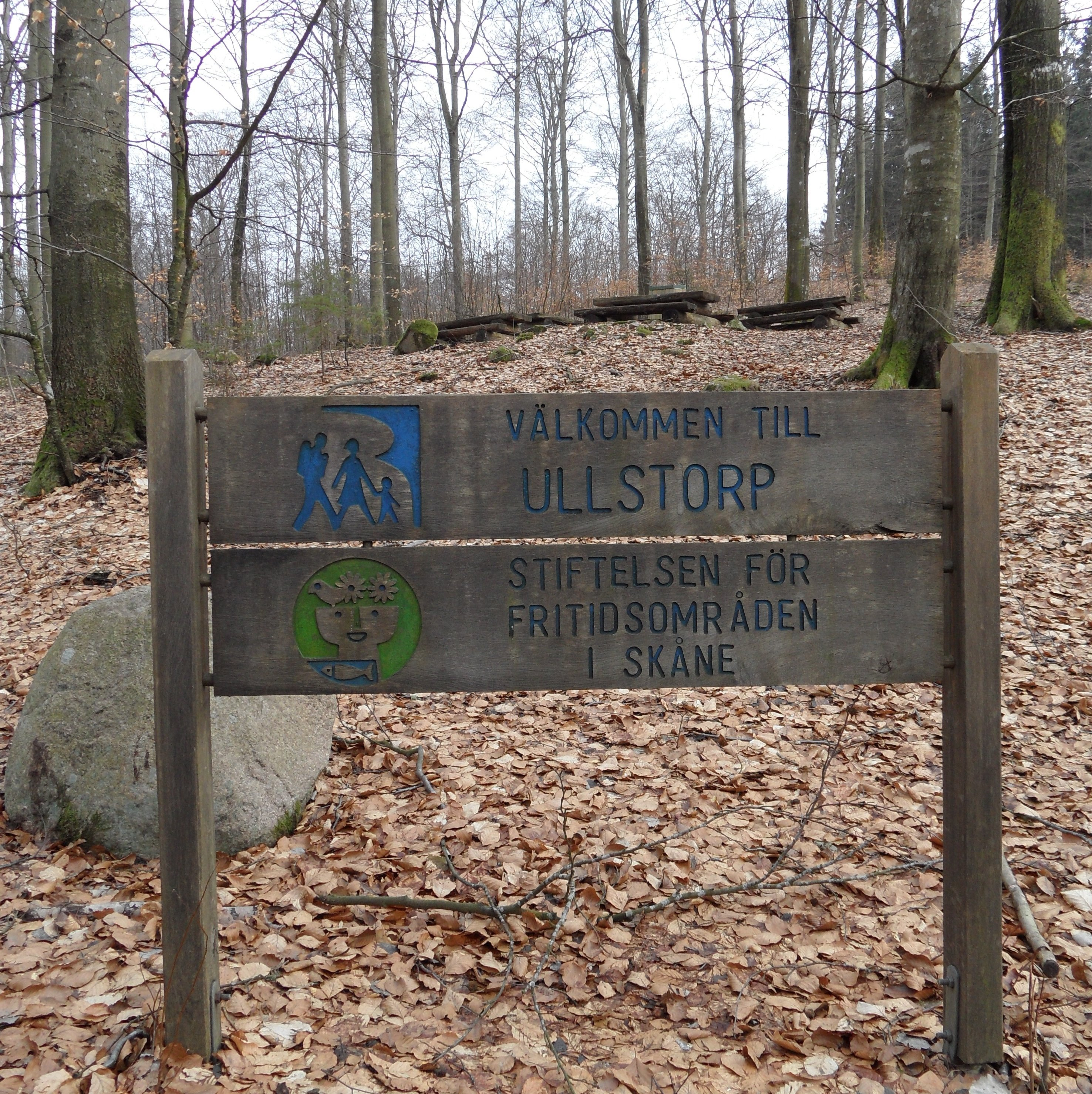 Välkomstskylt till naturreservatet Frostavallen-Ullstorp norr om Vaxsjön